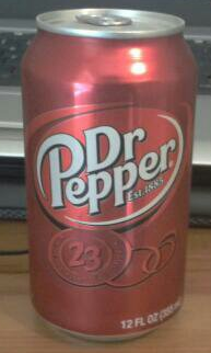 닥터페퍼 사진